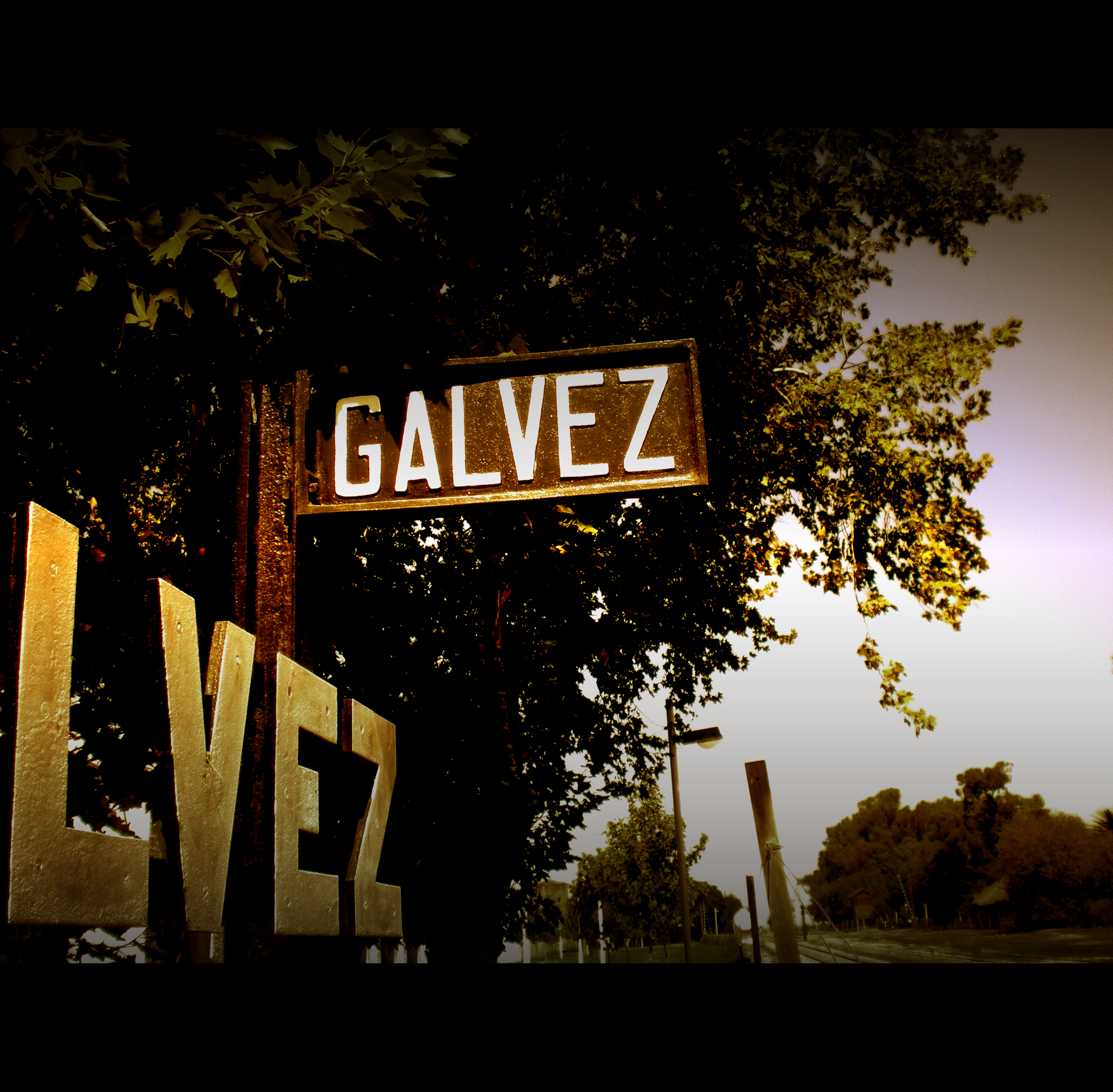 Fotografía: Diego Carmona